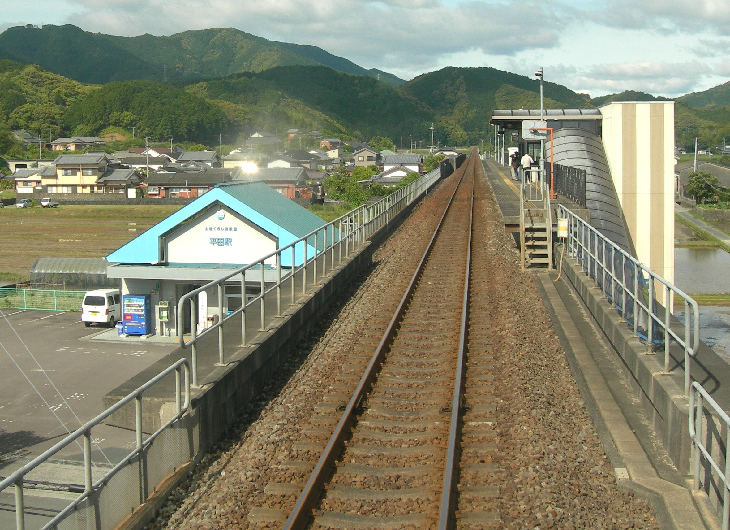 土佐くろしお鉄道平田駅